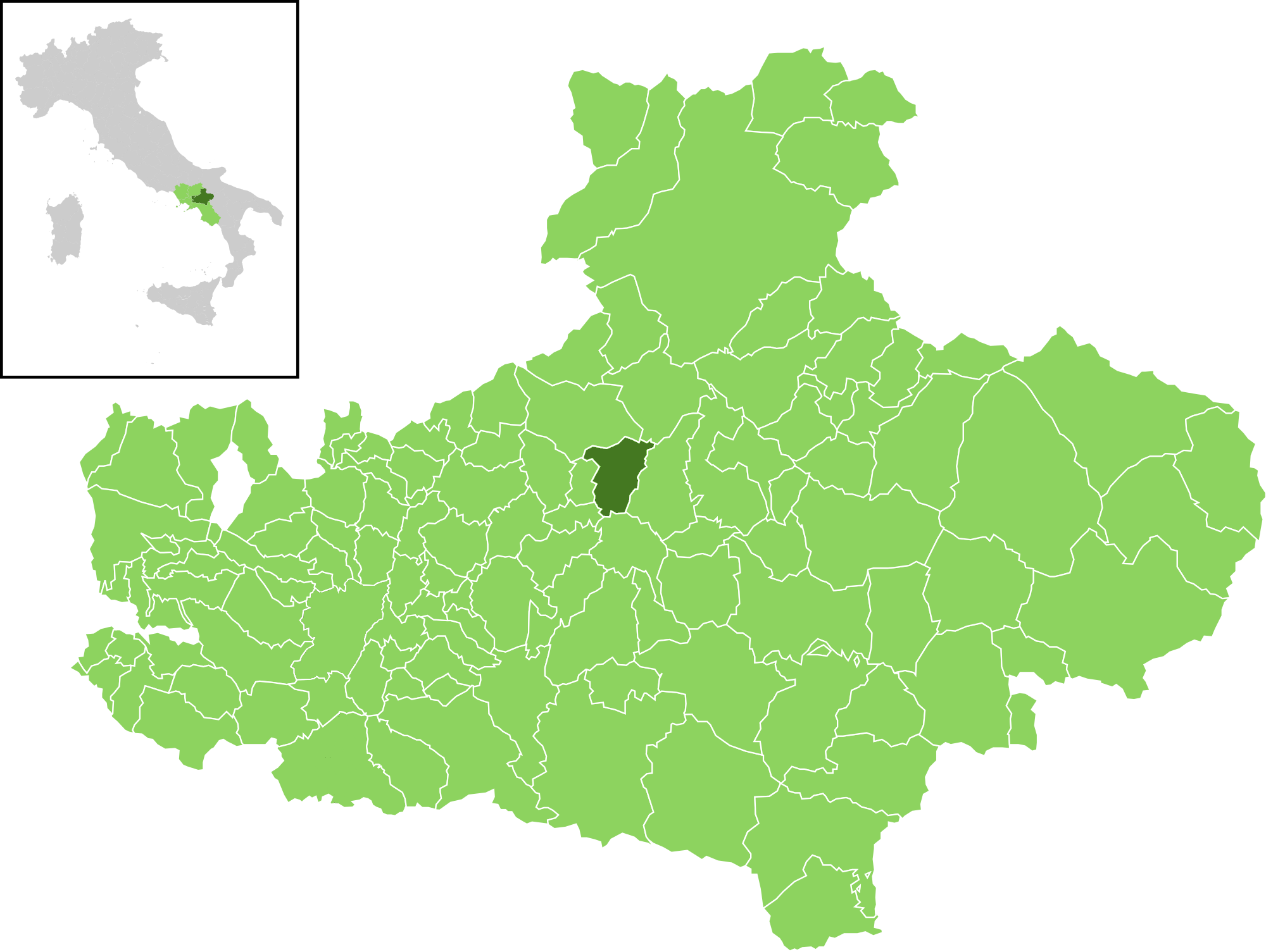 Il comune all'interno della provincia di Avellino